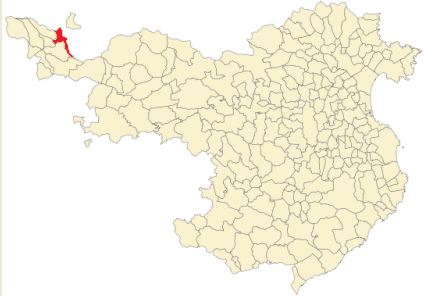 Situación de Puigcerdá en la provincia de Gerona.